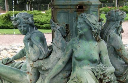 Fontaine de Tourny à Soulac-sur-Mer, Gironde, France